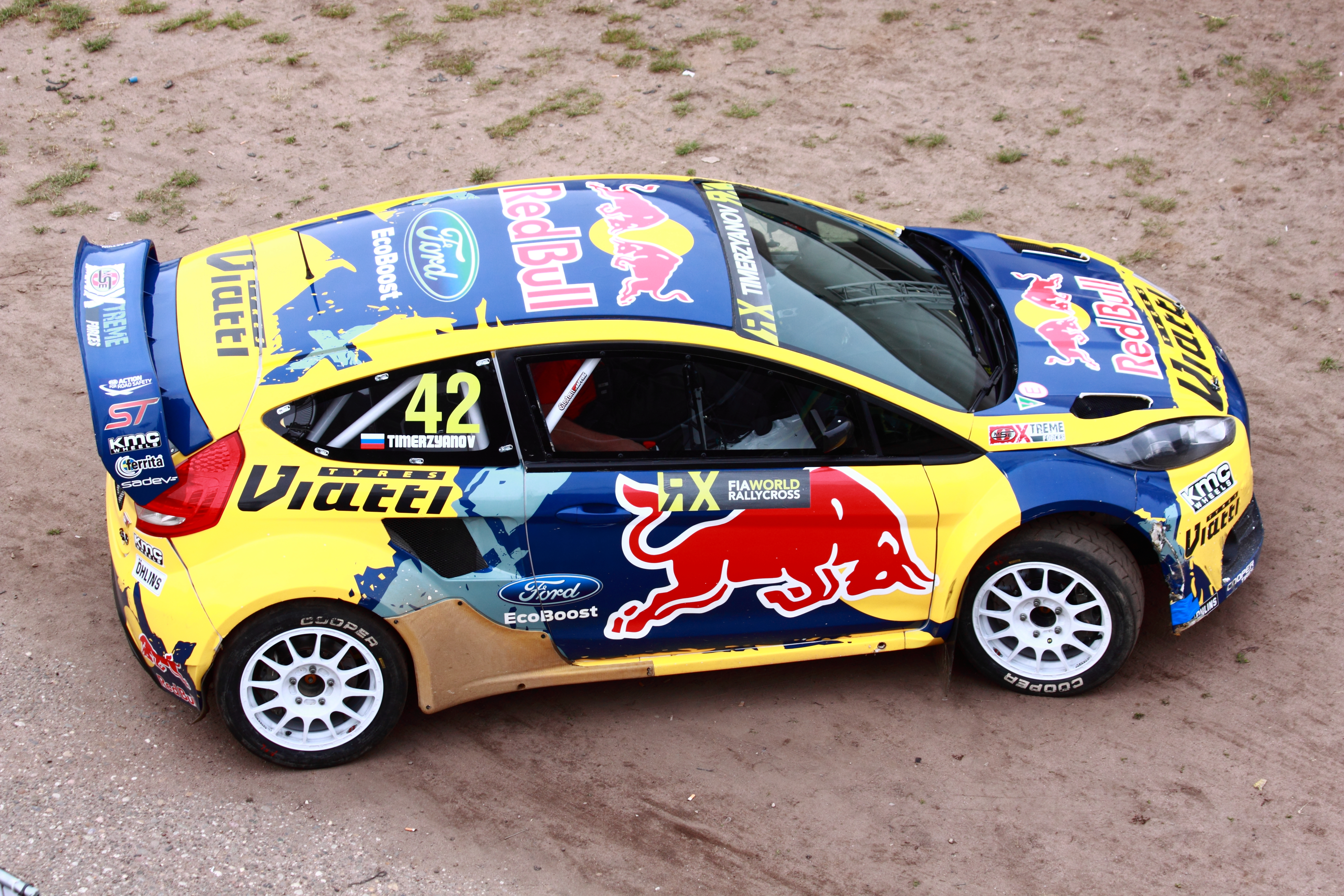 Timur Timerzyanov, Ford Fiesta ST, Team Namus OMSE